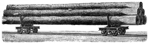 Decauville Langholzwagen im Decauville-Katalog von 1897 bis 1900